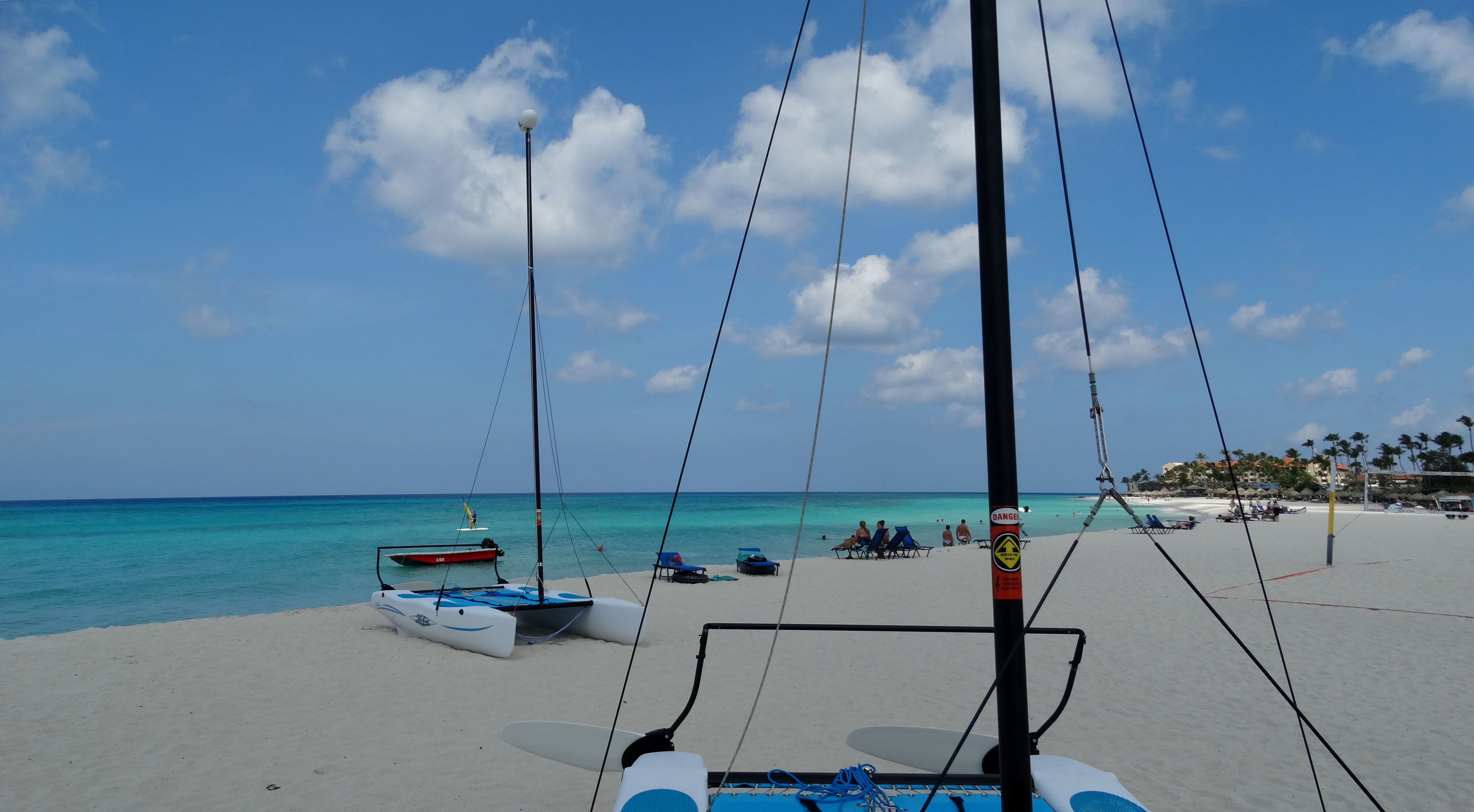 Hotel Tamarijn - Strandleven / Aruba 2014-09-20